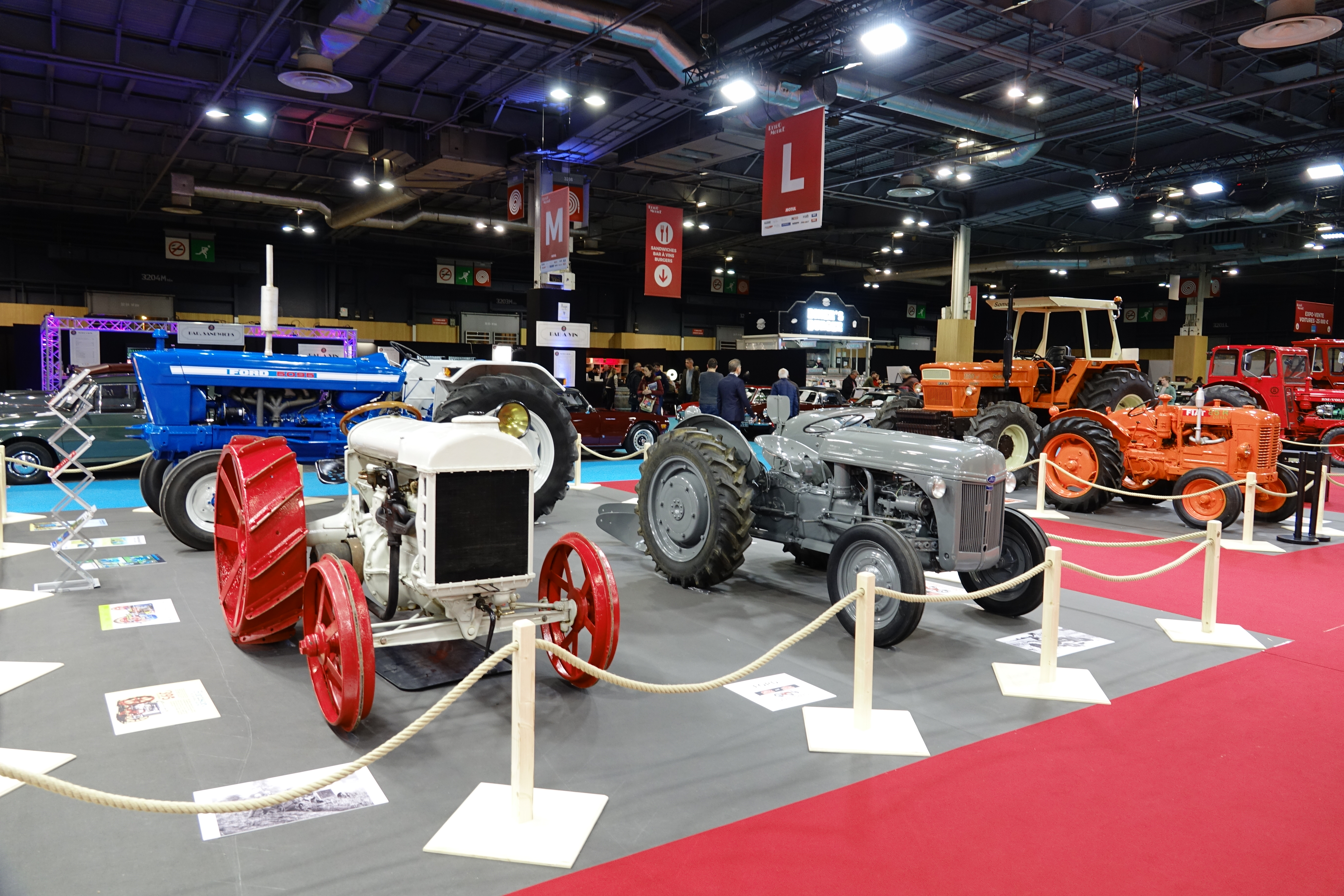 Exposition de tracteurs au salon Rétromobile 2020